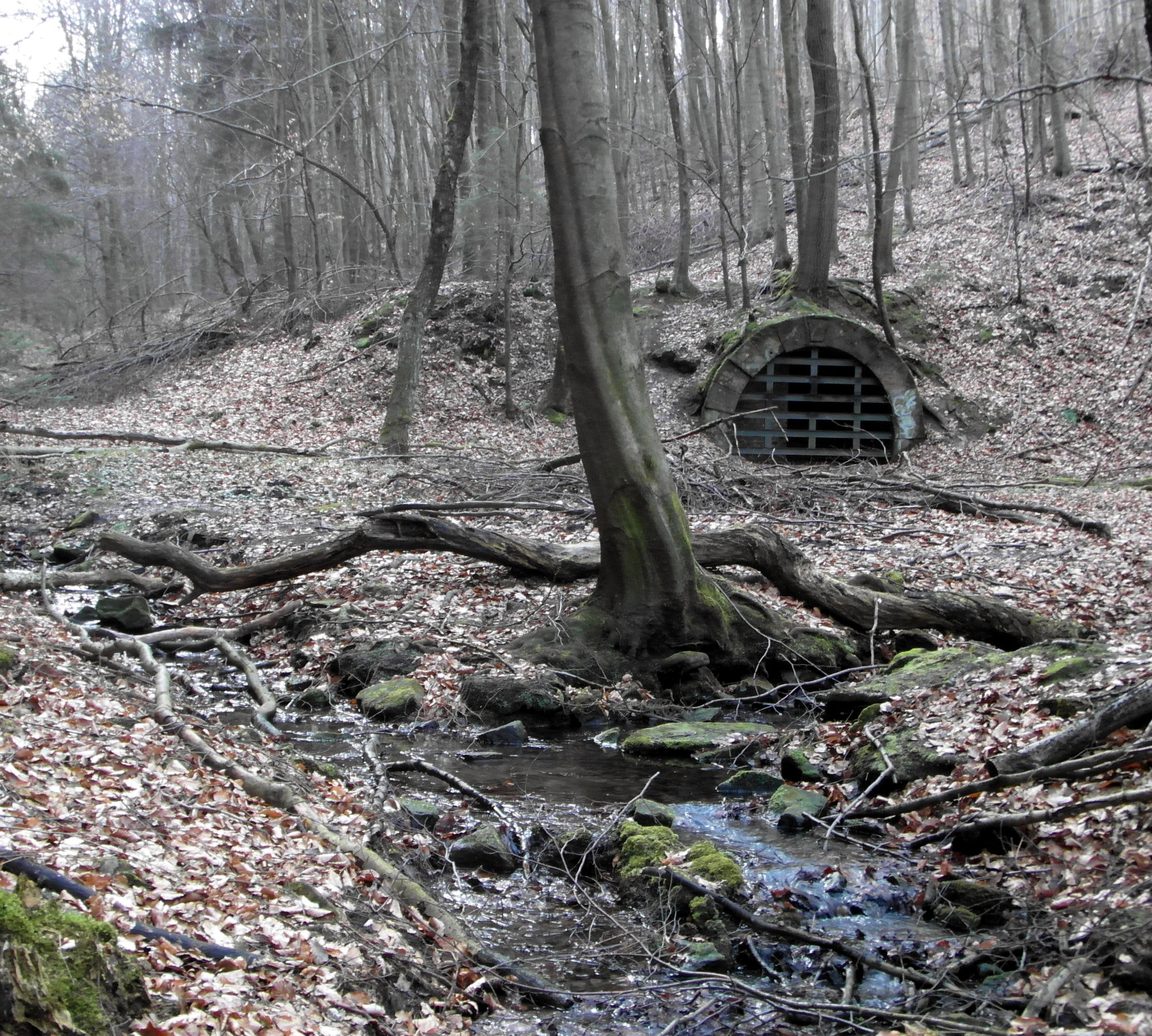 Das Mundloch des Egestorfer Stollen im Stockbachtal im Deister südlich des Barsinghäuser Stadtteils Egestorf. Im Vordergrund der Stockbach.